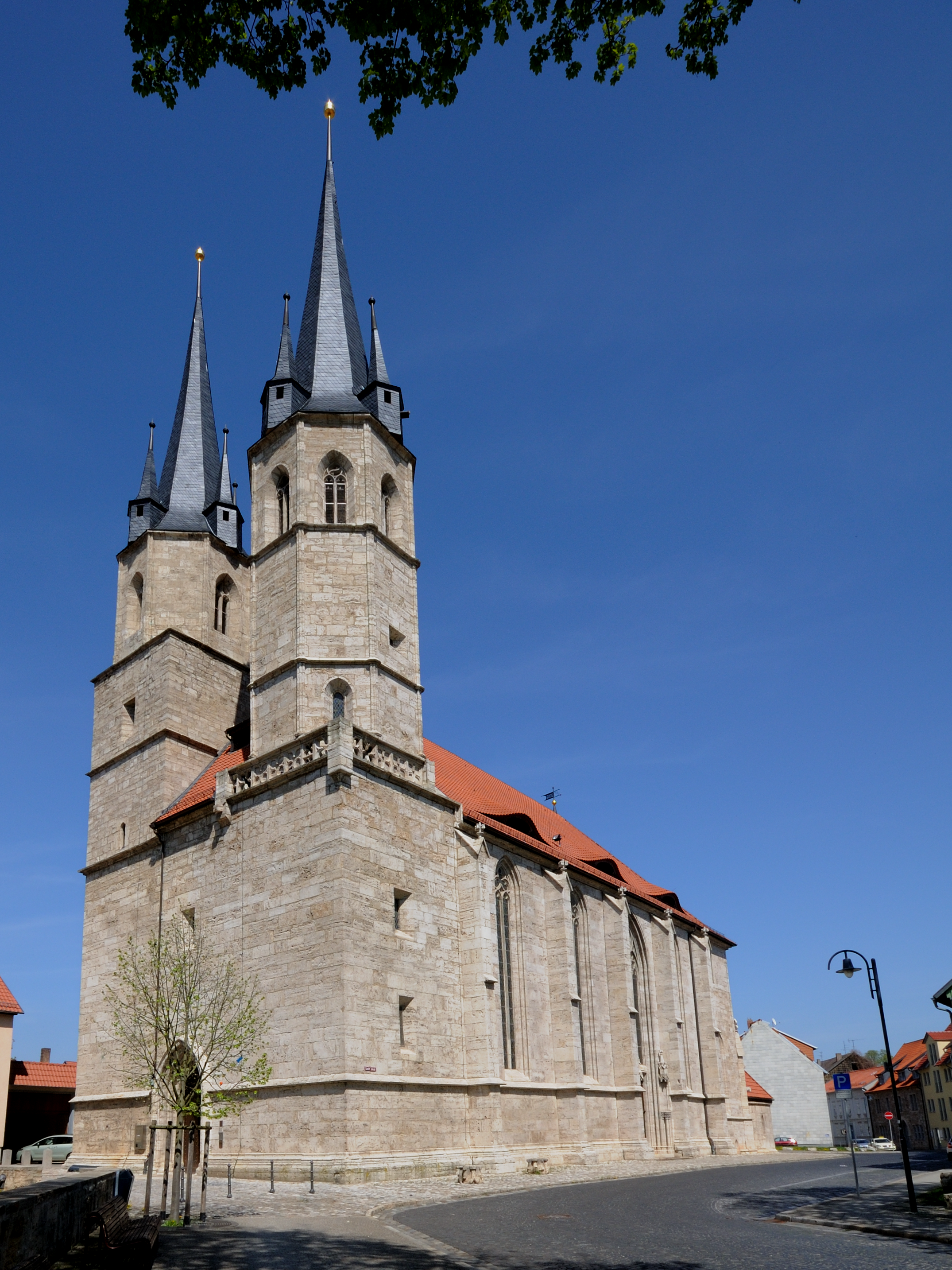 Jakobikirche Mühlhausen/Thüringen (Ab 2001 Einbau der Stadtbibliothek)